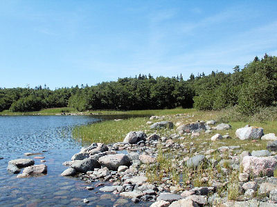 Söderöra, Sweden